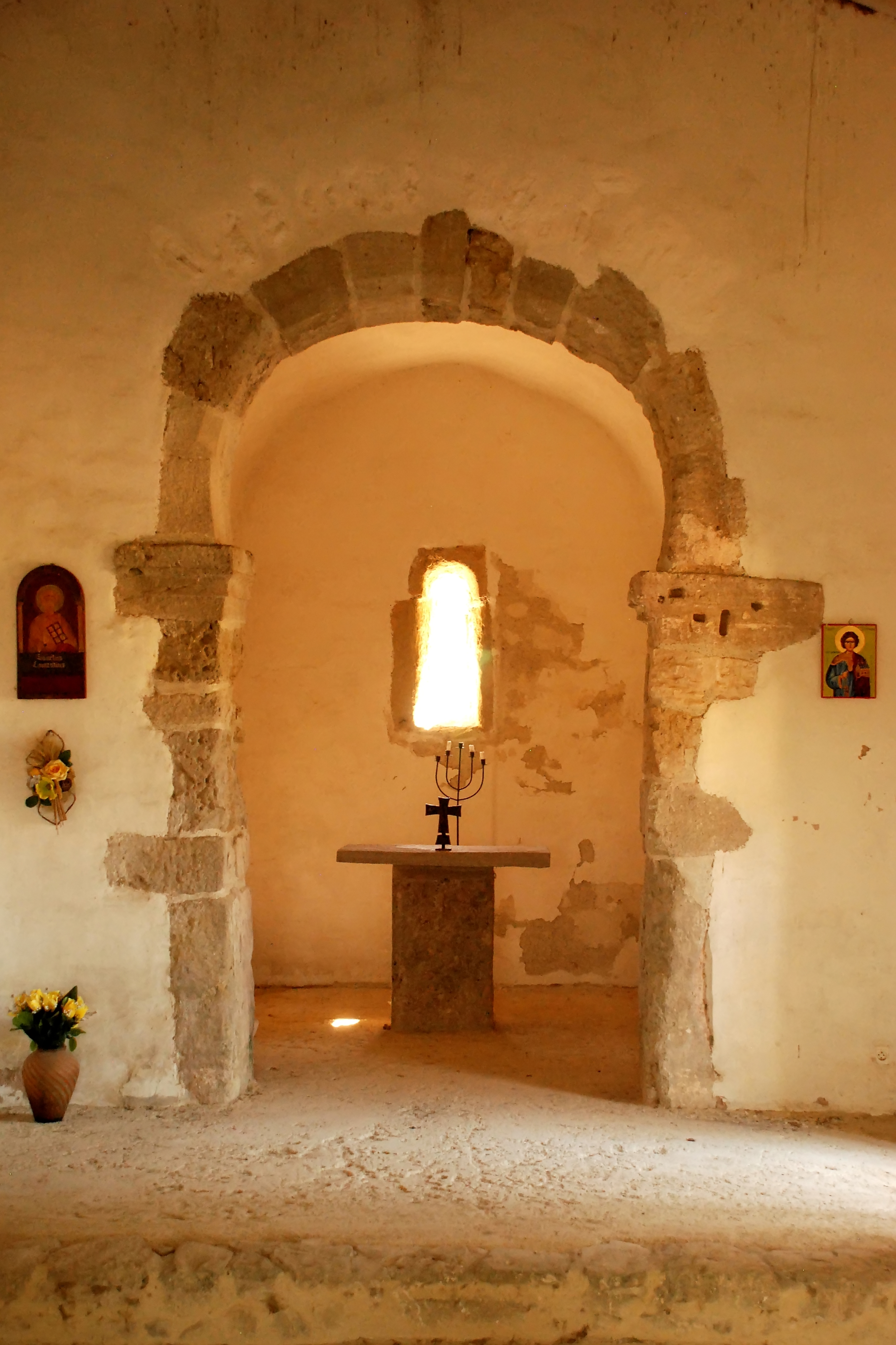 France - Languedoc - Aude - Moussan - chapelle Saint-Laurent (préroman) .